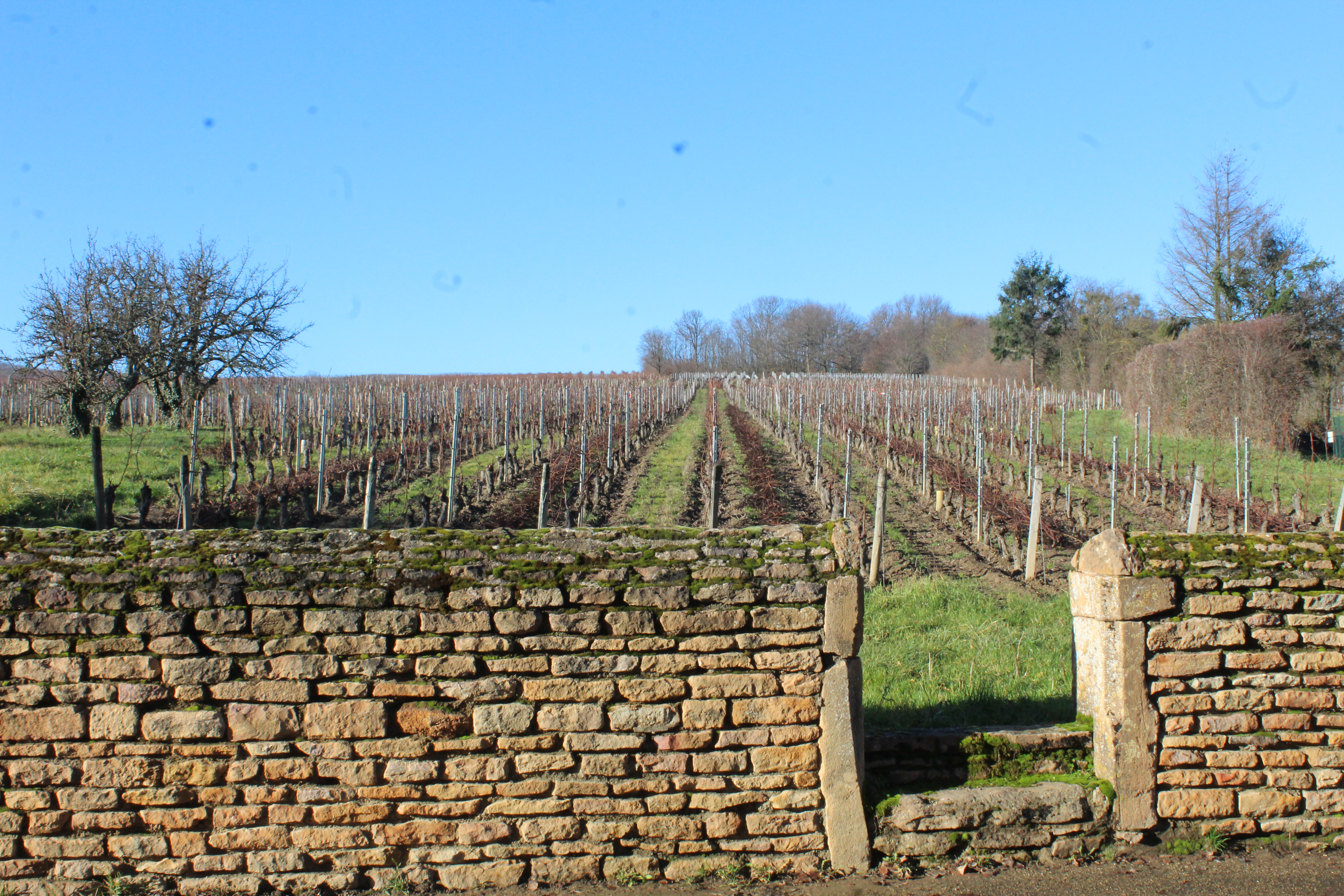 Vignoble du Pouilly-loché à Loché.